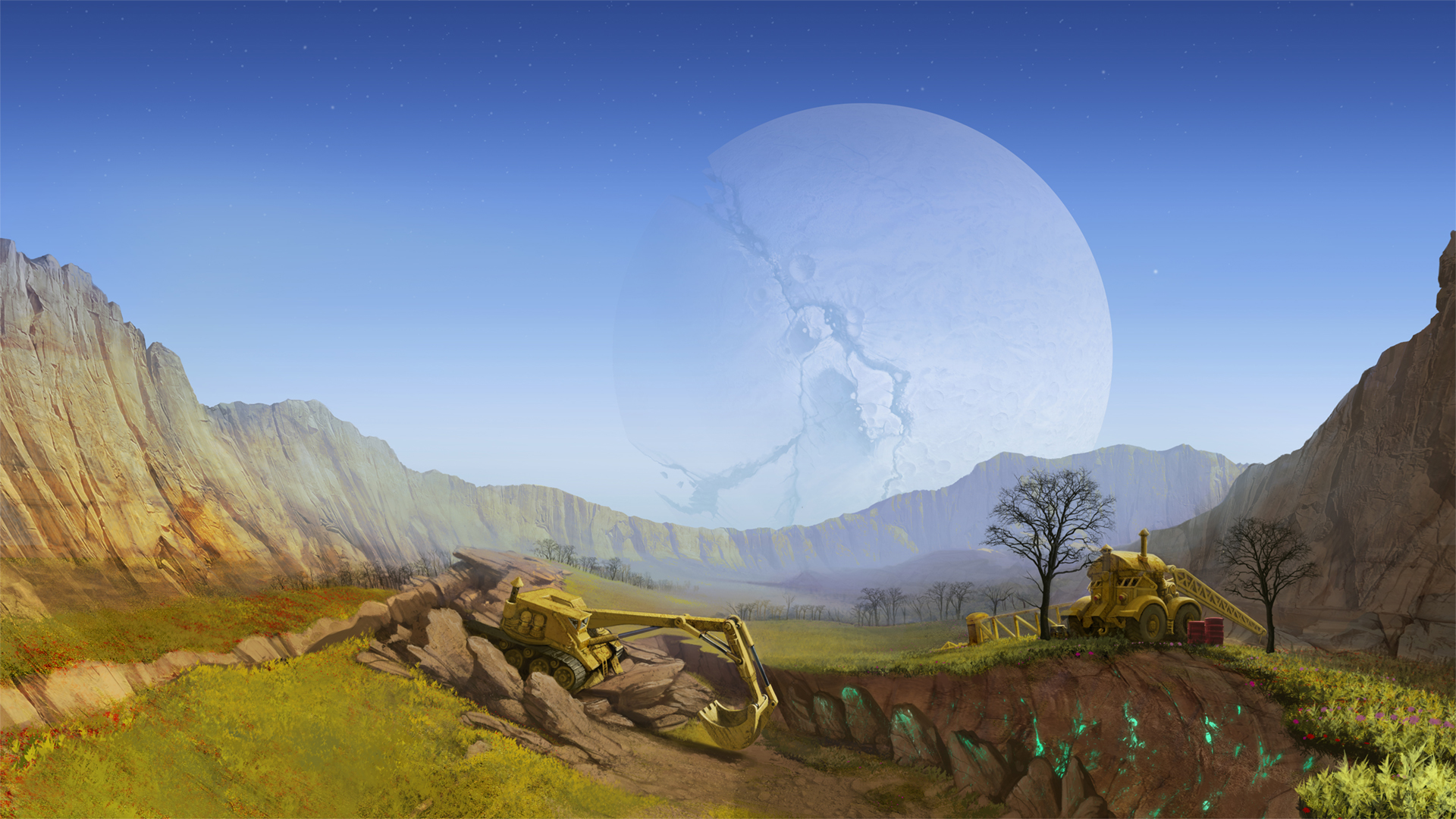 BioGaming